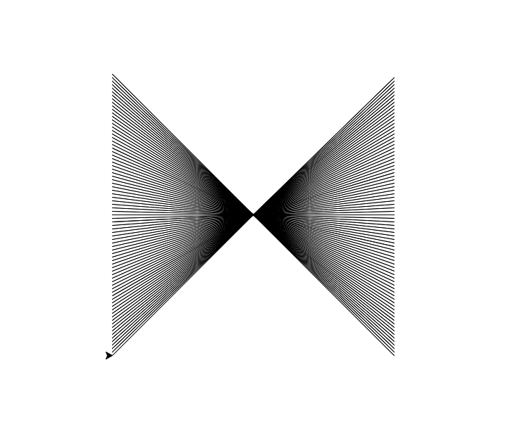 Beispiel für ein Muster erstellt mit Python's Turtle Graphic